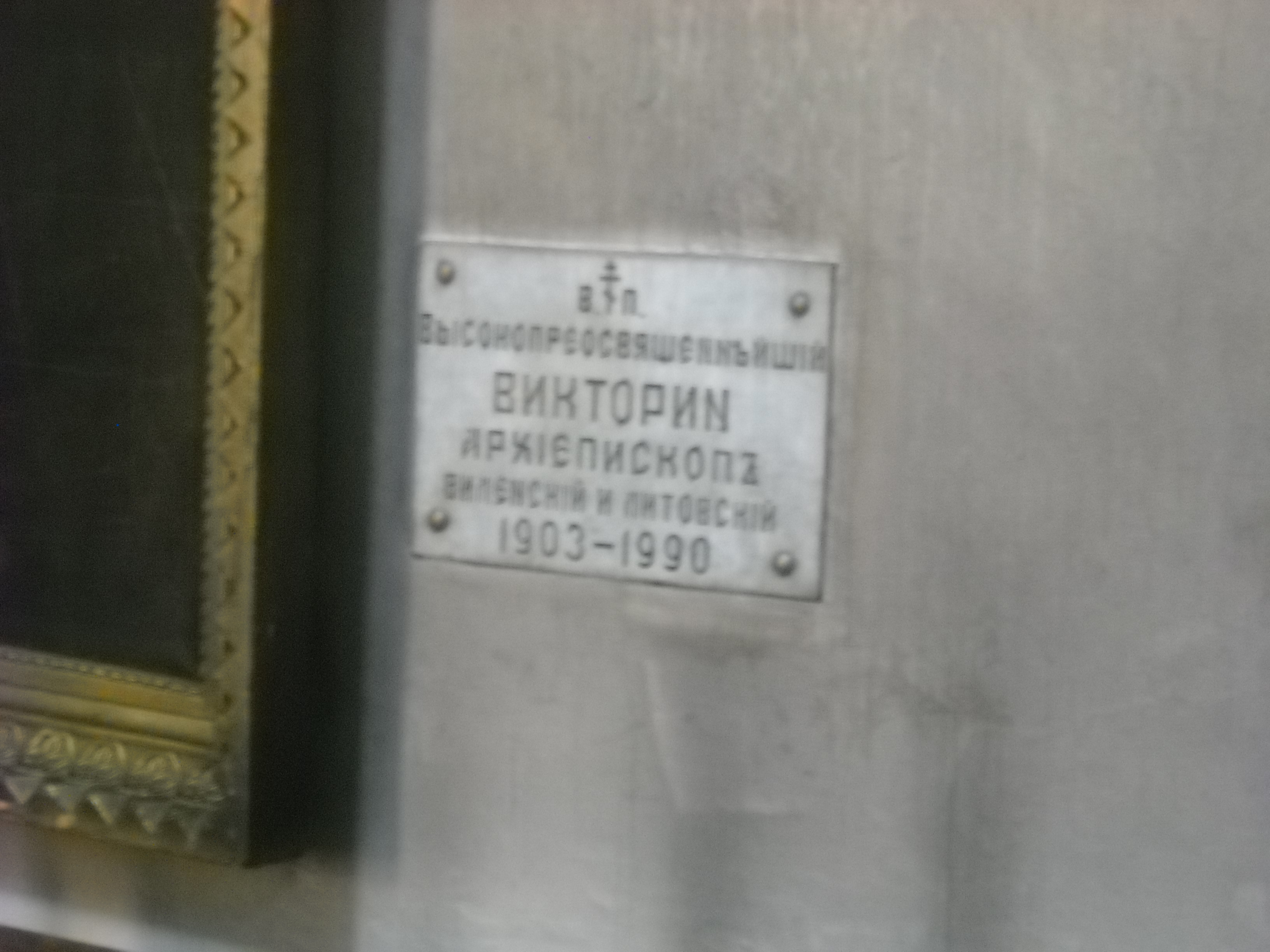 Tablica nagrobna arcybiskupa wileńskiego i litewskiego Wiktoryna (Bielajewa) w cerkwi Św. Ducha w Wilnie